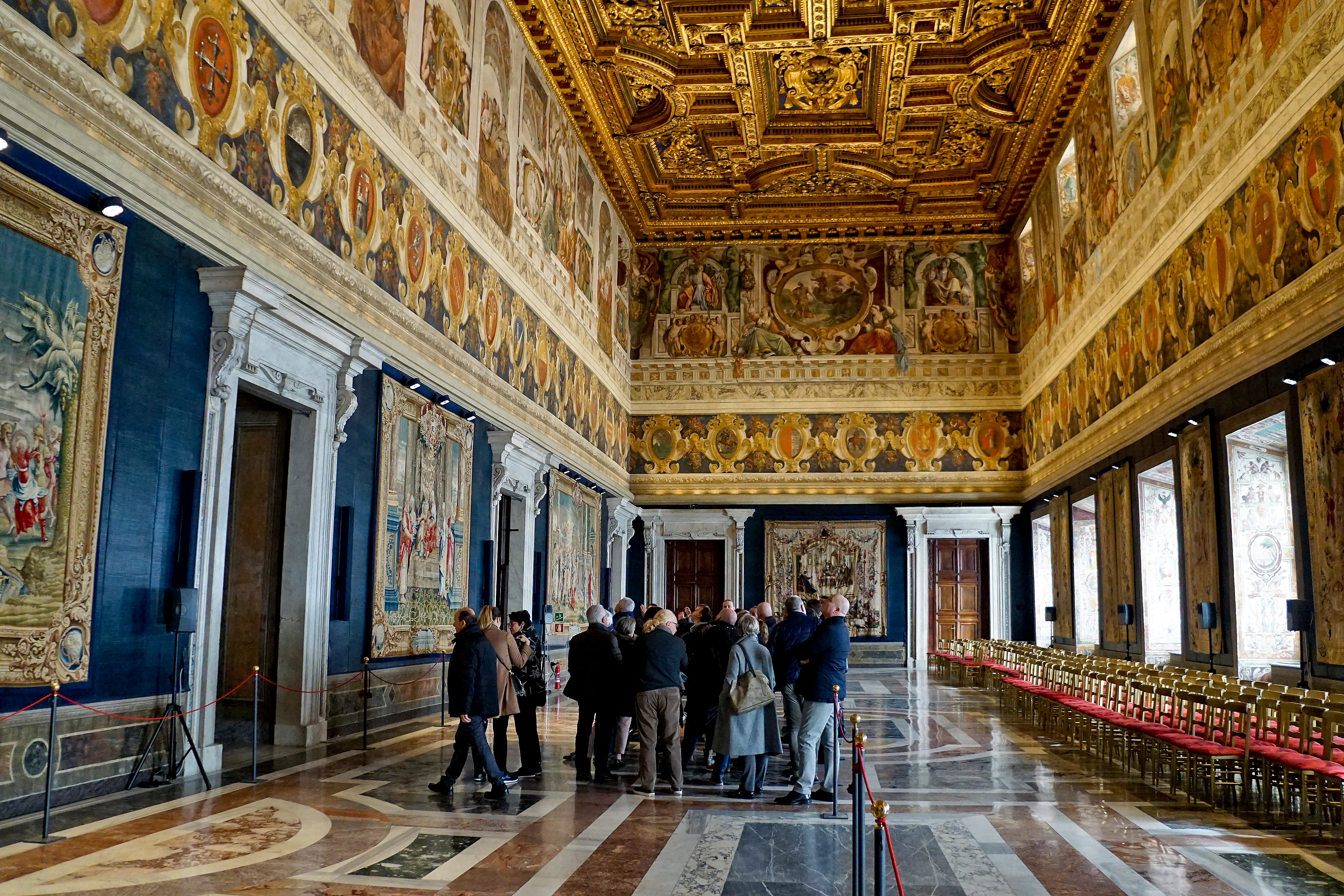 aDSC03542